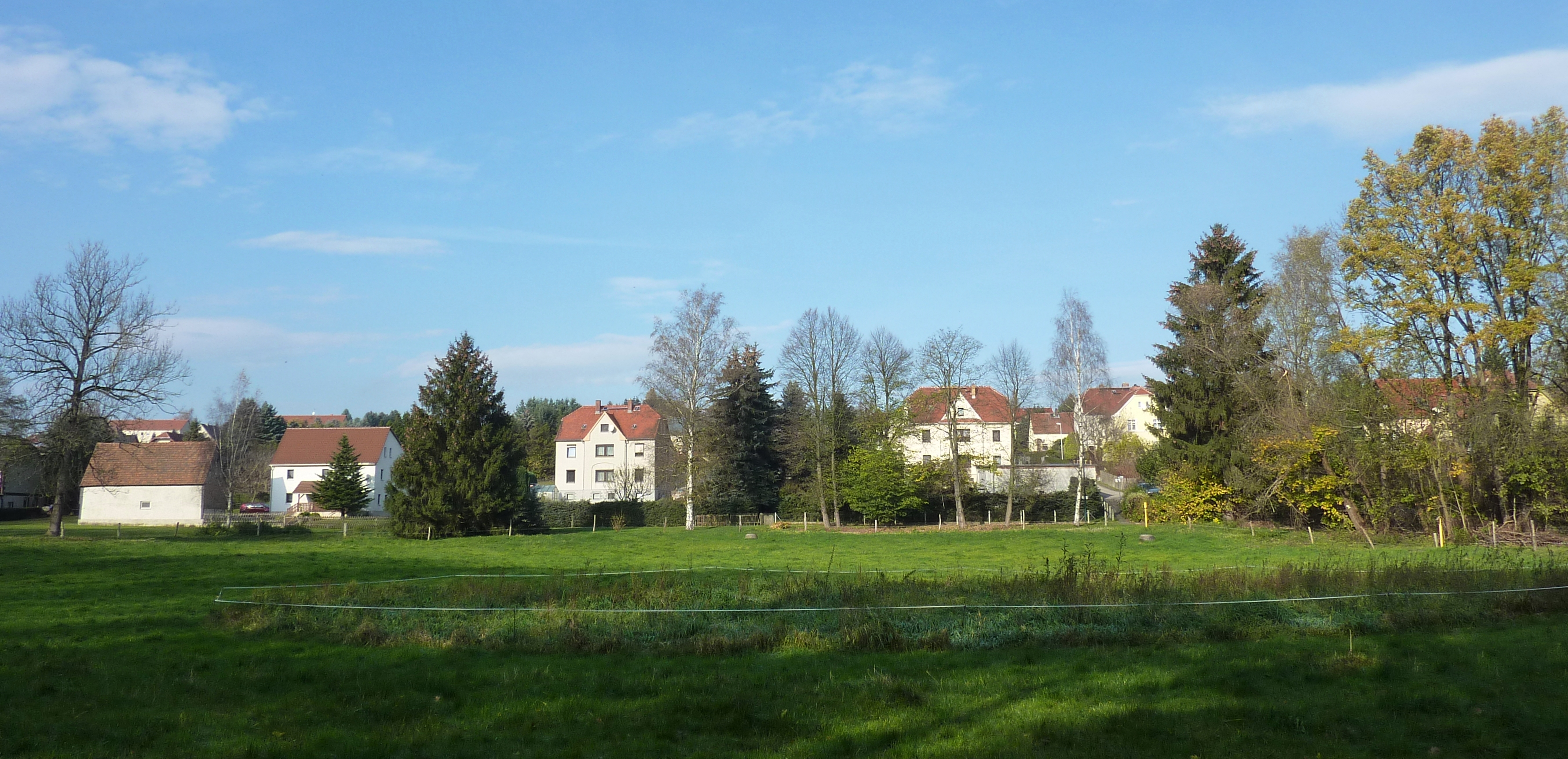 Panoramaansicht auf die Siedlung Ebersdorfer Weg.